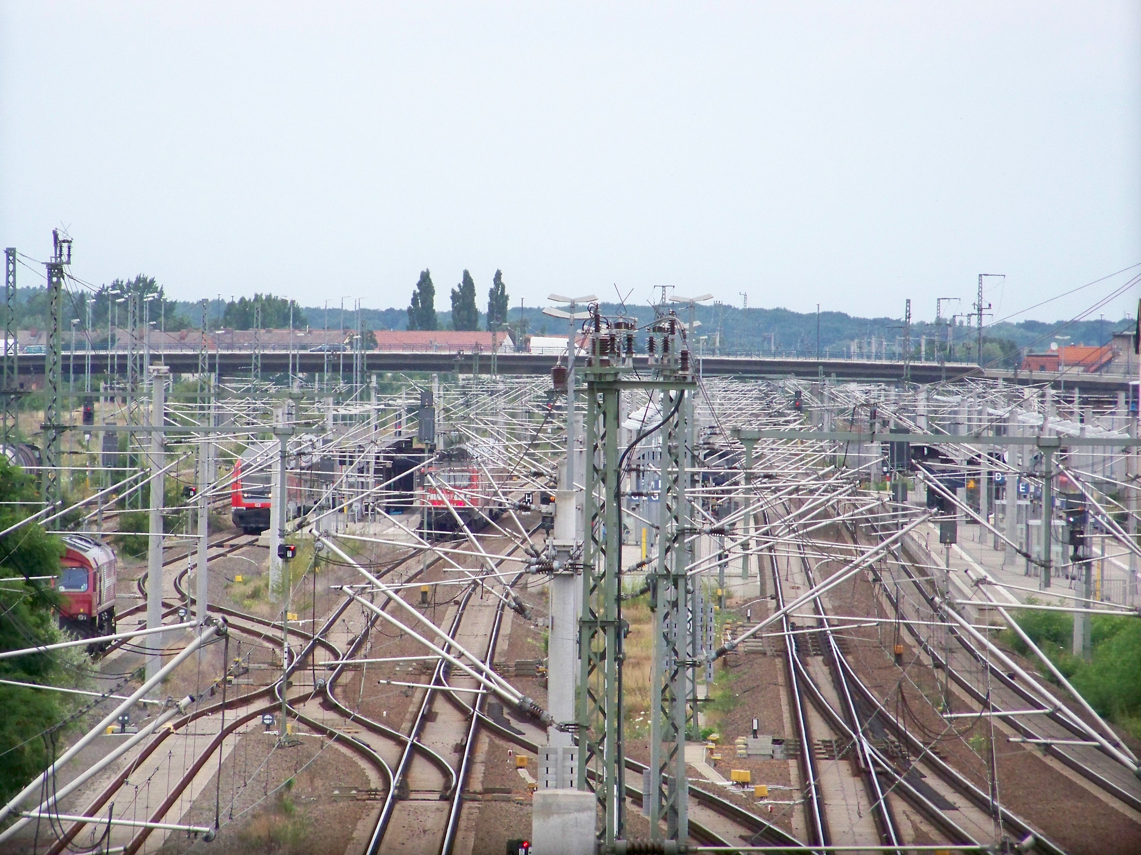 Bahnhof Bitterfeld aus der Ferne Richtung Norden blickend